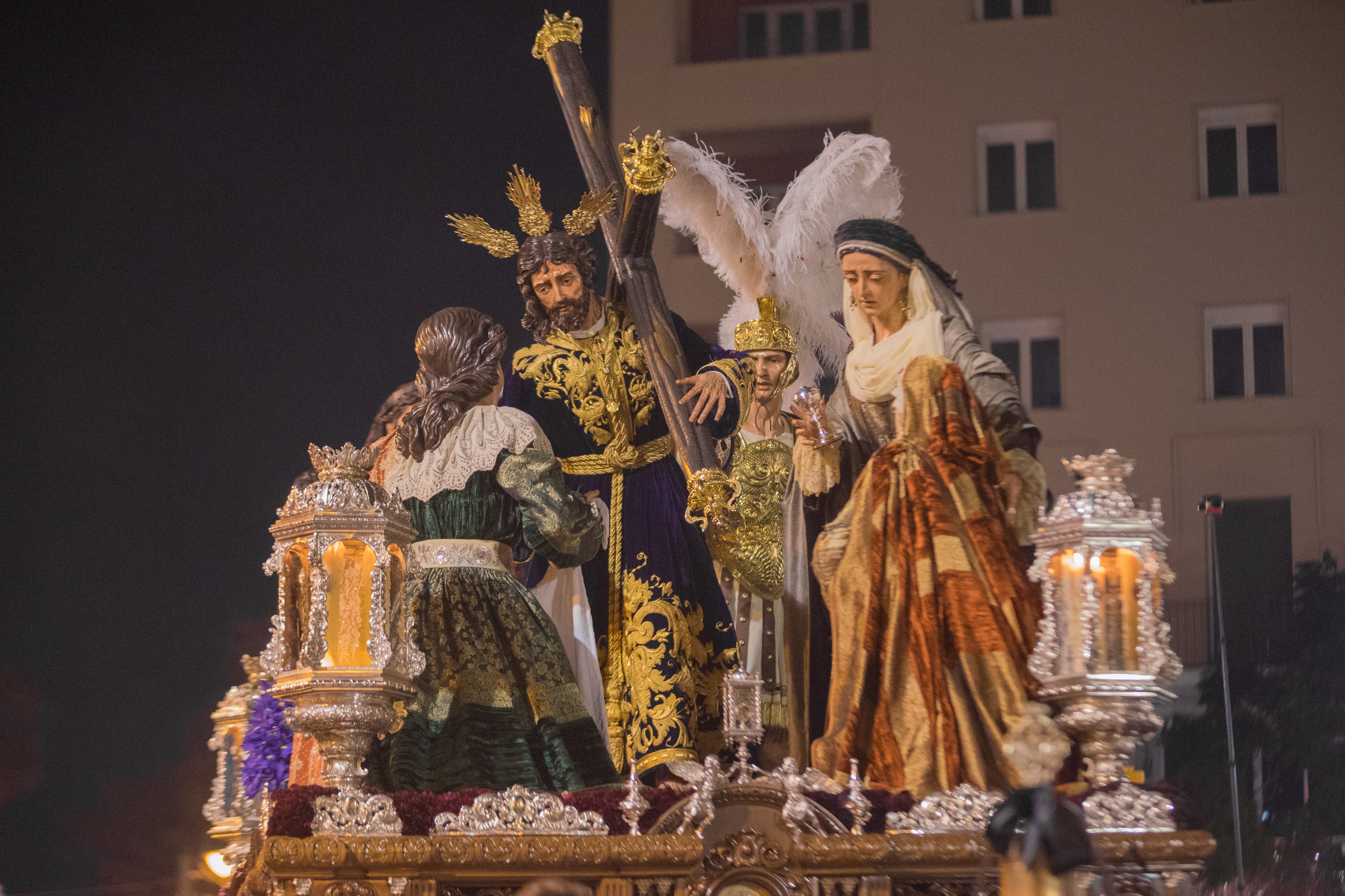 Trono del Jesús Nazareno de la Fervorosa Hermandad y Antigua Cofradía del Divino Nombre de Jesús Nazareno de la Salutación, María Santísima del Patrocinio Reina de los Cielos, San Juan Evangelista, Santa Mujer Verónica y de la Santa Faz de Nuestro Señor Jesucristo. This is a photography of a Folklore festival in Spain (Wikidata id Q9075883).